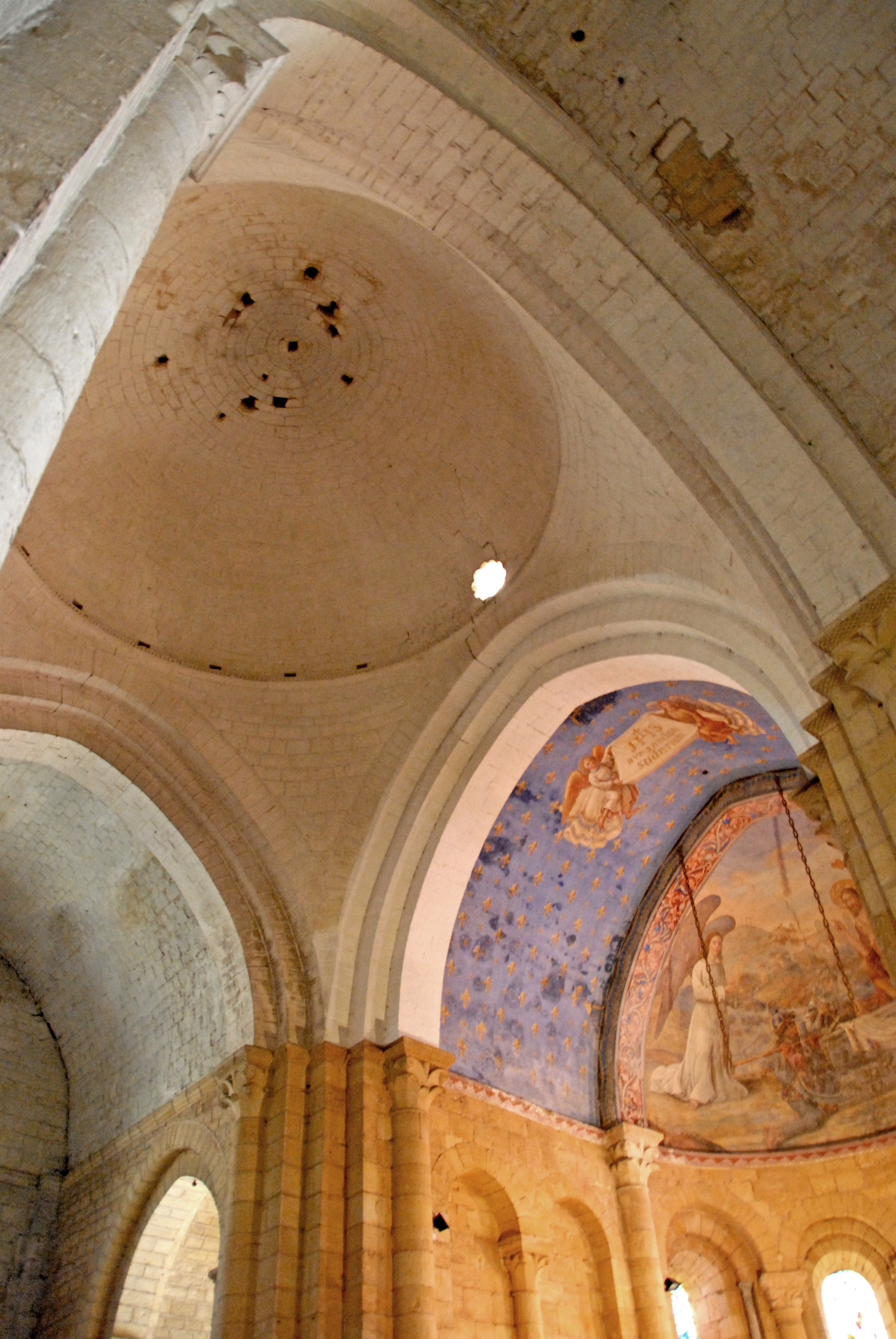 Cadouin, Pendentifkuppel in der Vierung